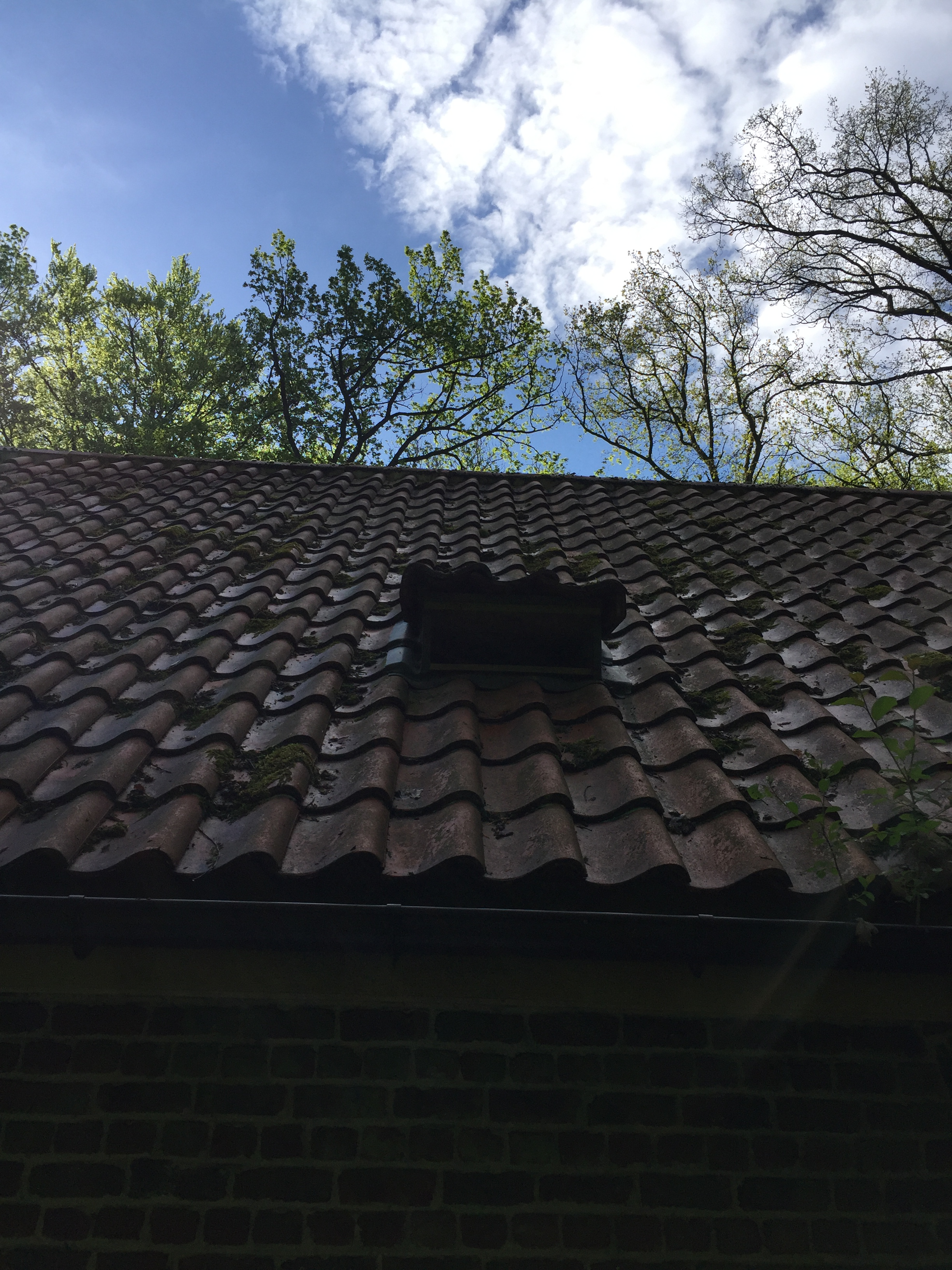 Entrée pour chauve-souris.